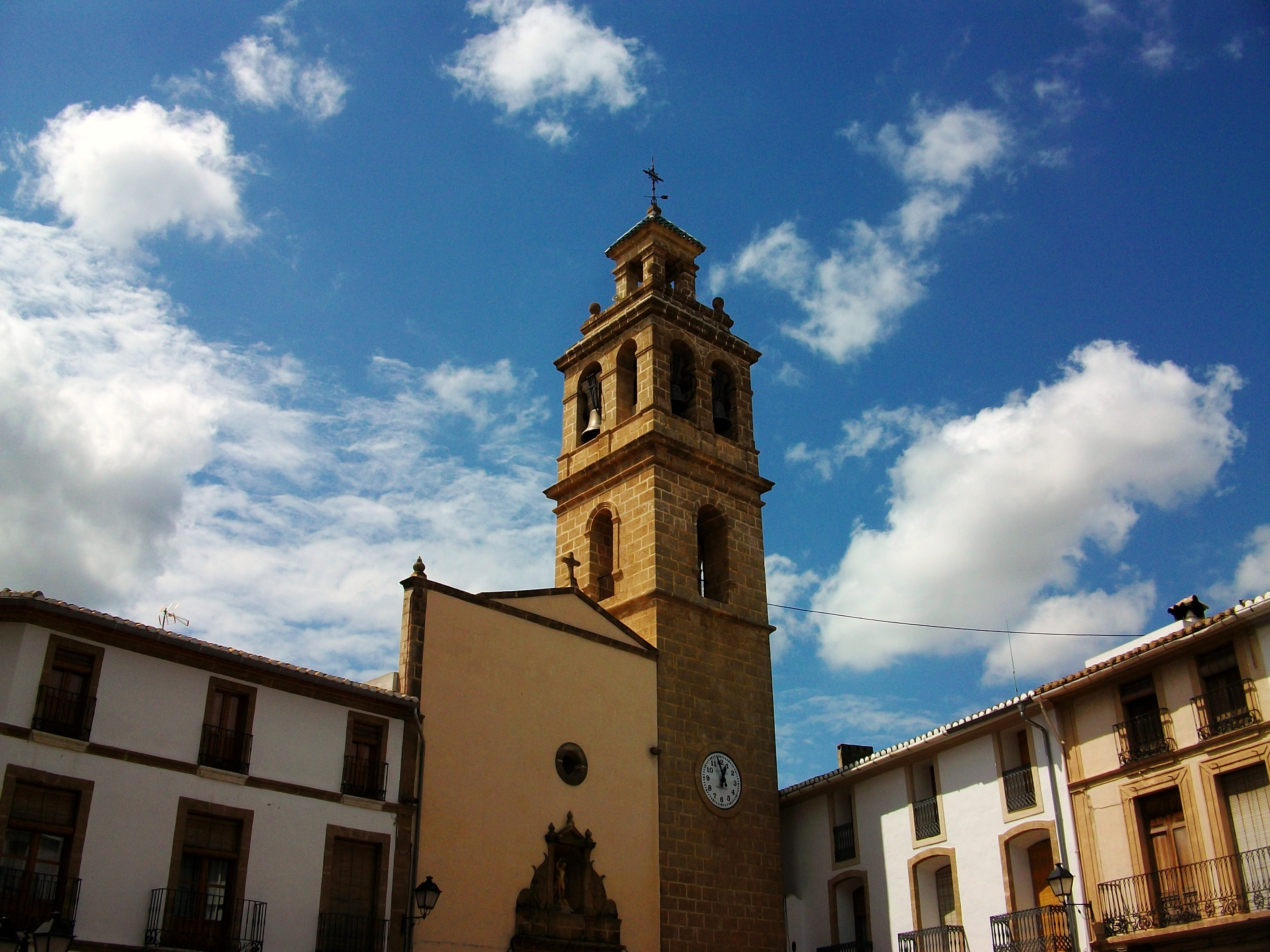 Església de Sant Miquel Arcàngel de Gata de Gorgos, Marina Alta, País Valencià.